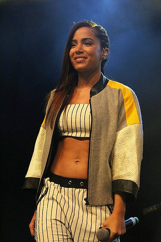 Anitta para Coca Cola Jeans.